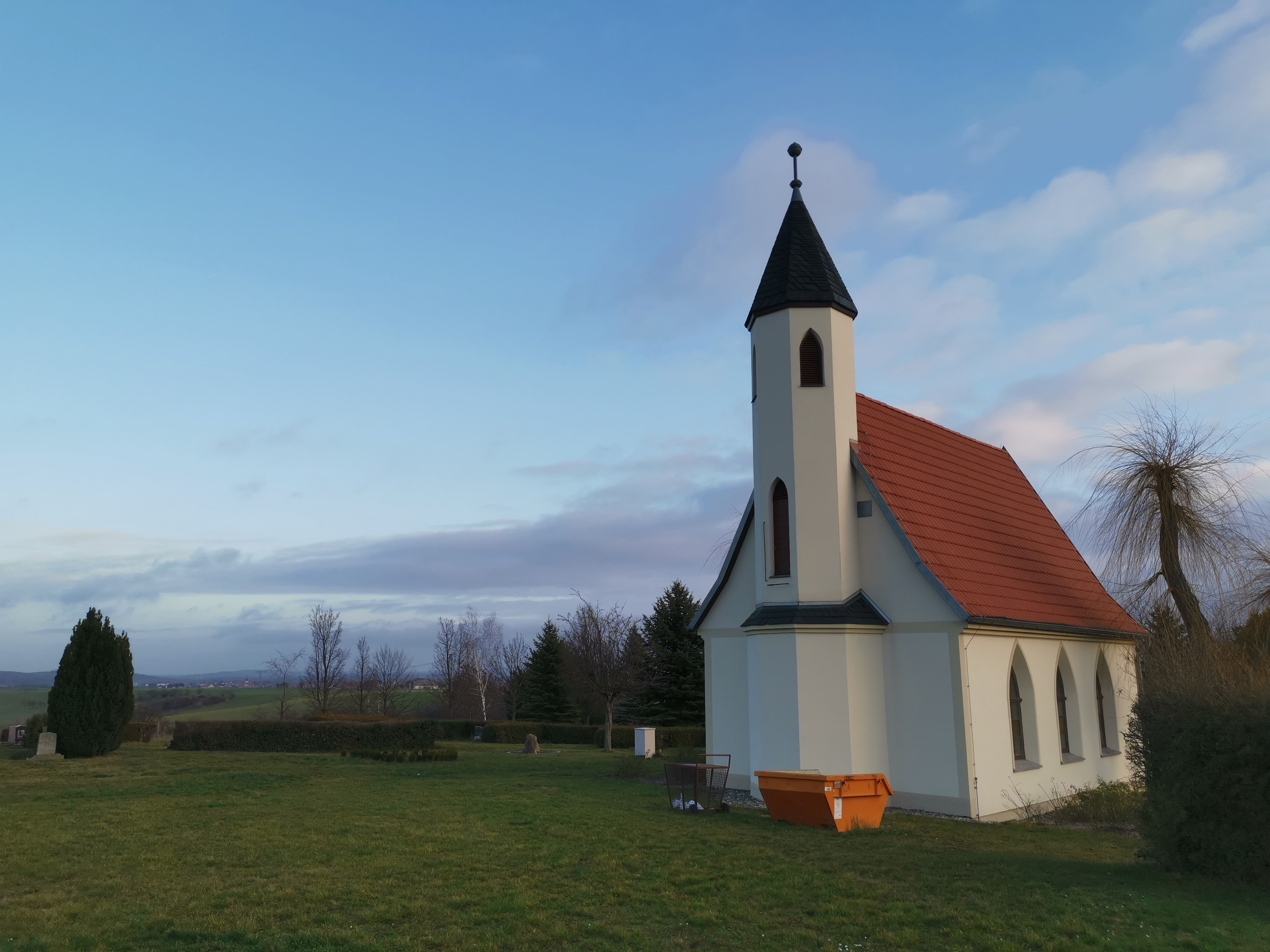 Friedhofskapelle in Timmenrode